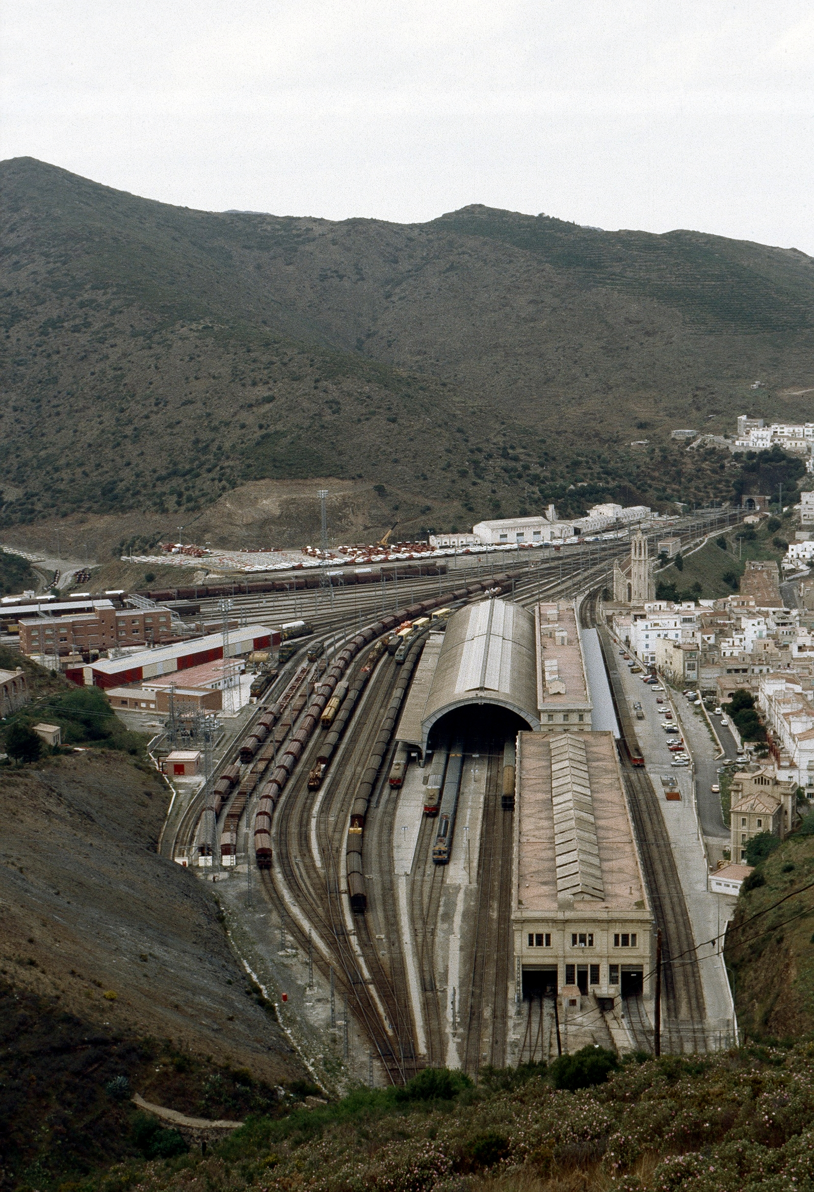 Estación de Portbou